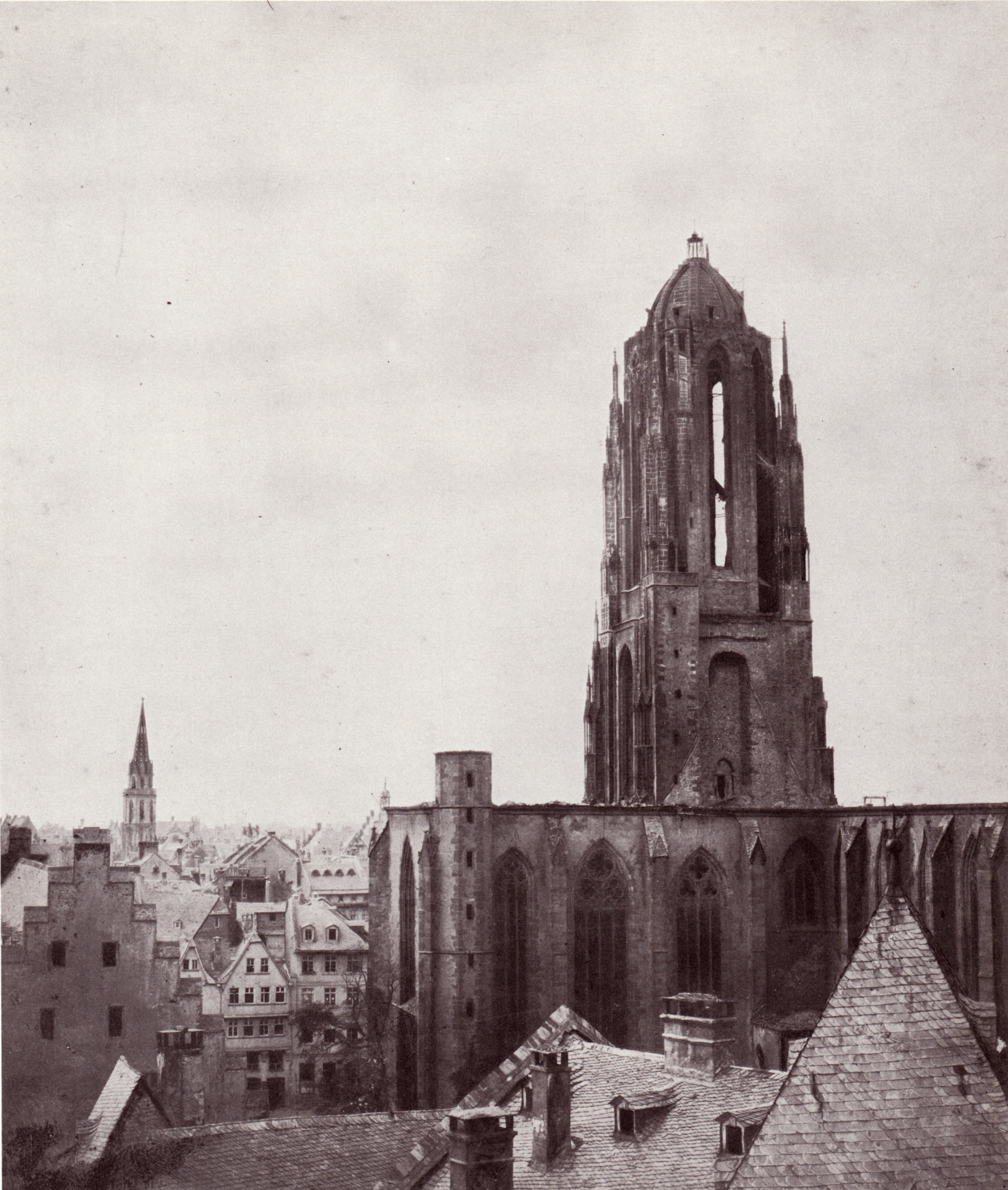 Der Frankfurter Kaiserdom nach dem Brand 1867